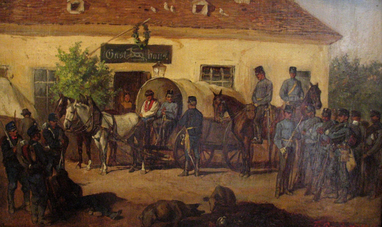 Manöver der k.u.k.-Armee in Maustrenk bei Zistersdorf, im Rahmen der Herbstmanöver 1876 in Nikolsburg, Mähren.